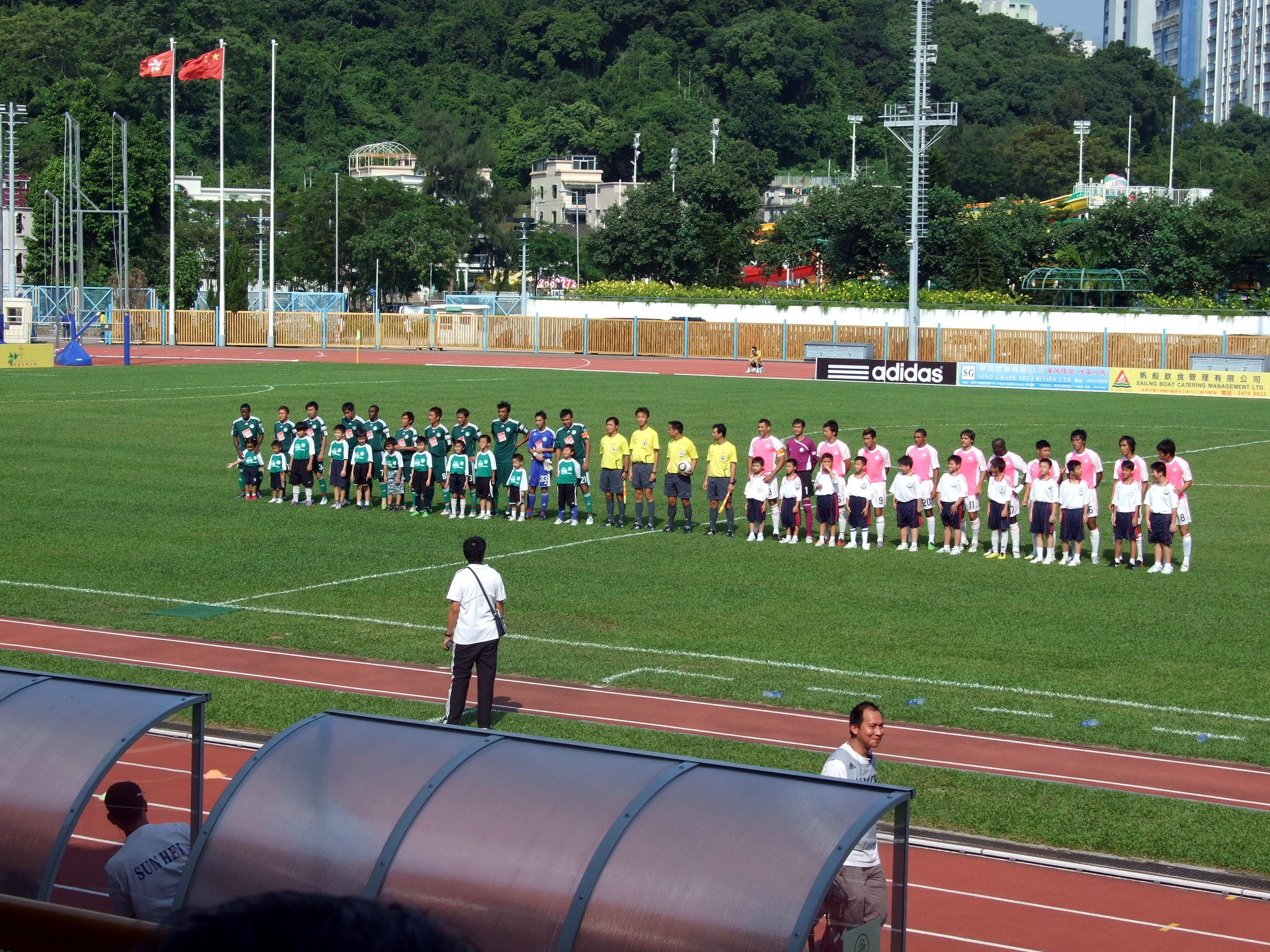 中文（香港）: 大埔於國慶假期主場迎戰晨曦